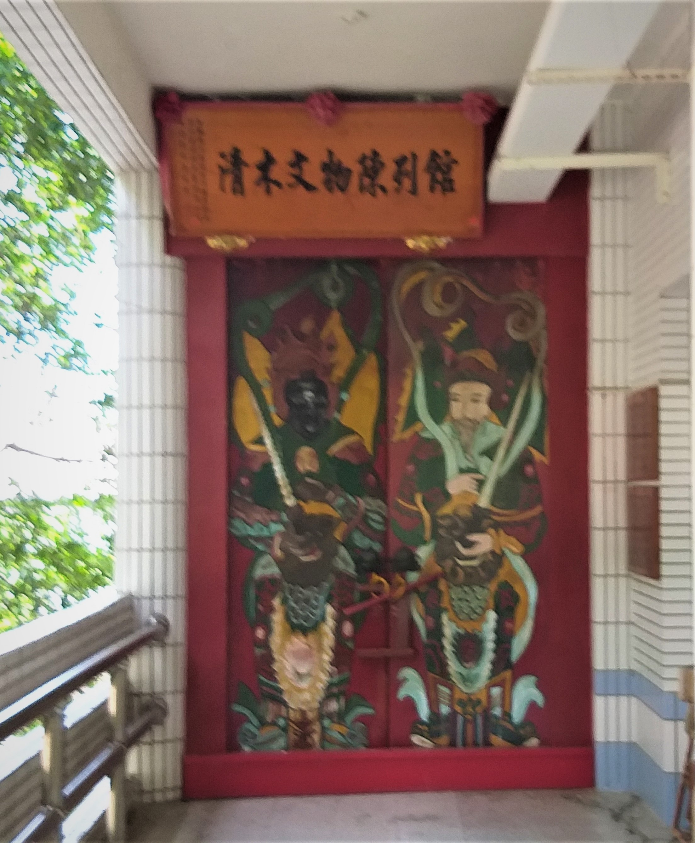 內柵國民小學古物文物館及門神